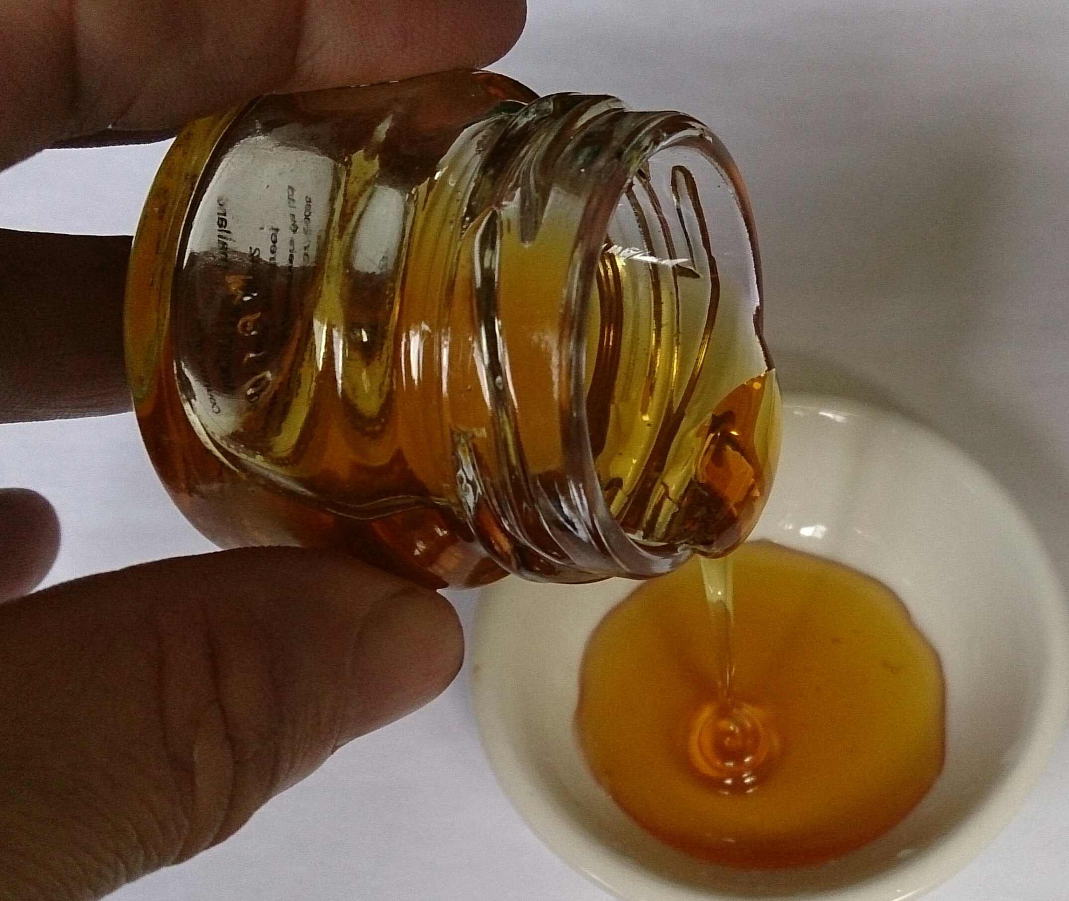 sweet stuff